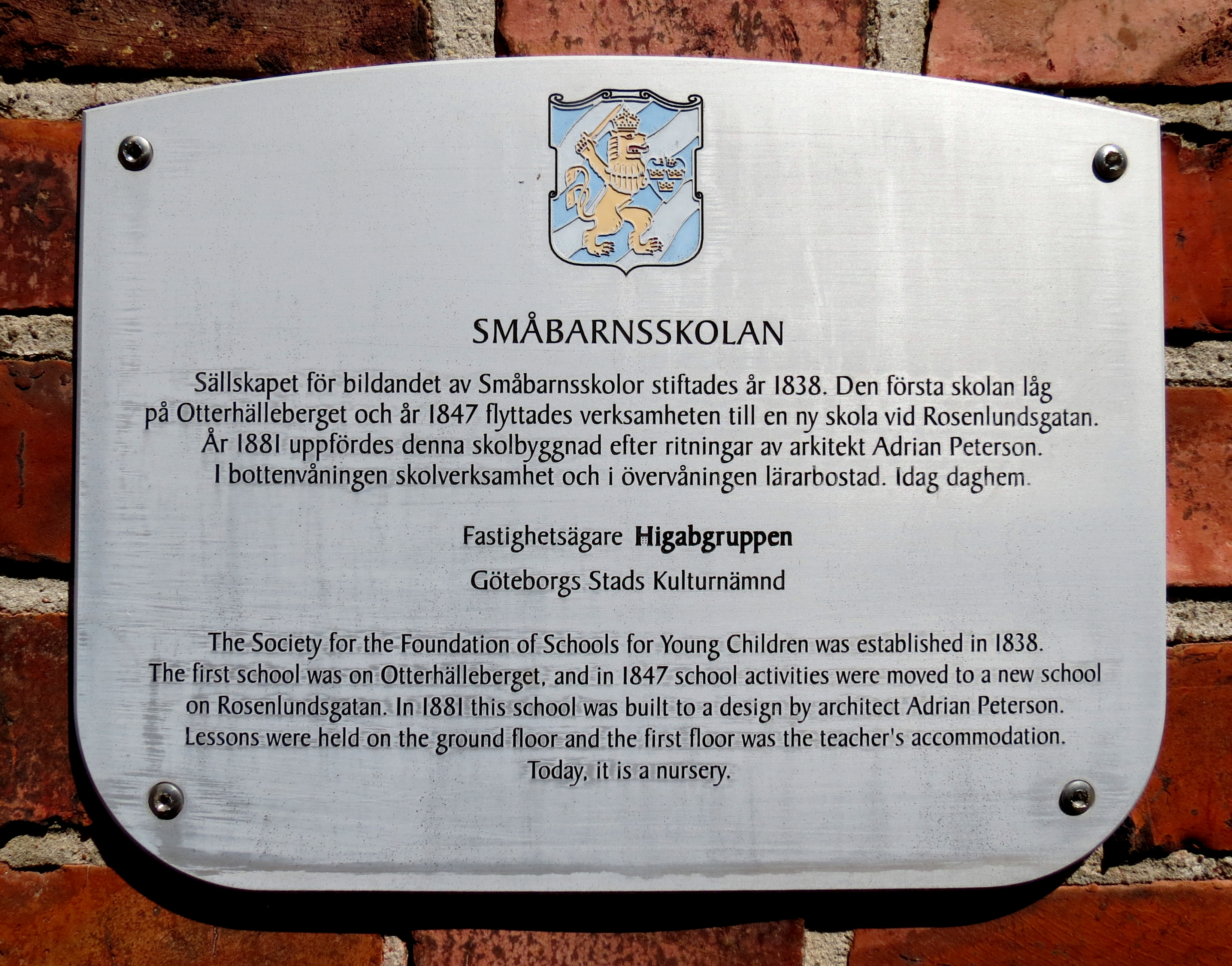 Plakett uppsatt på södra gaveln till Småbarnsskolan, Vasastaden, Göteborg. Plaketten sattes upp som en del av Göteborgs stads kulturnämnds "Projekt Husmärkning" omkring åren 2000–2001 där drygt hundra skyltar ingick. Se även boken "100 utmärkta hus i Göteborg". Vid en inventering av kommunen gjord 2016 satt 69 skyltar fortfarande uppe.